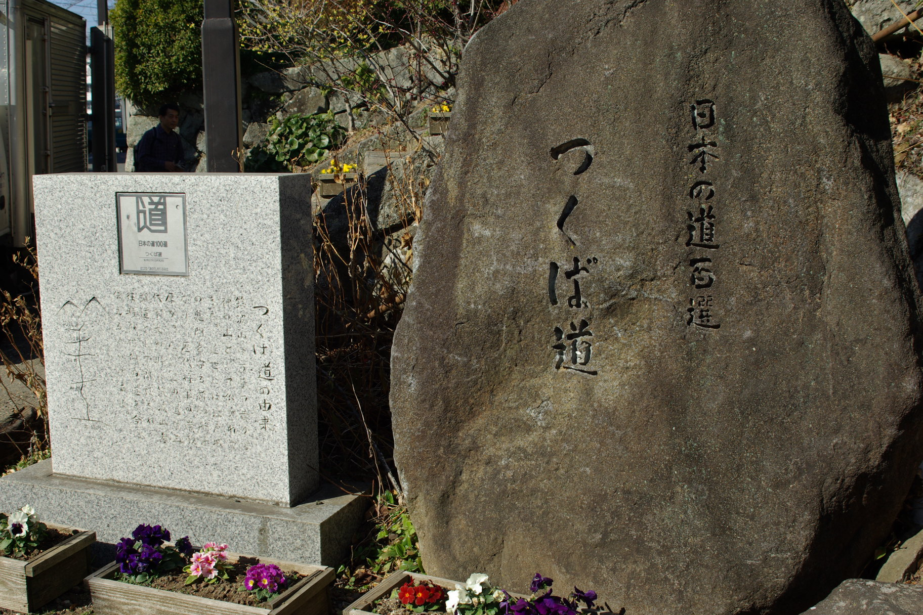 つくば道の起点にある石碑